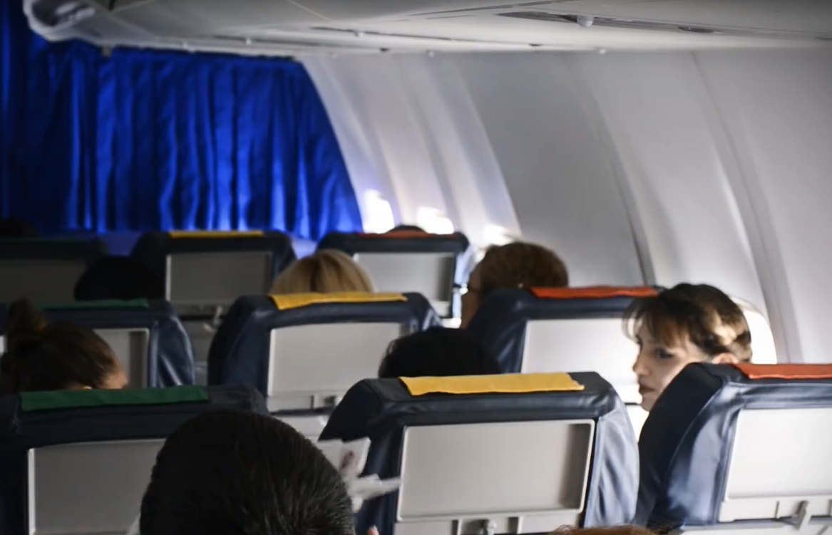 Kabinenprodukt ArAC